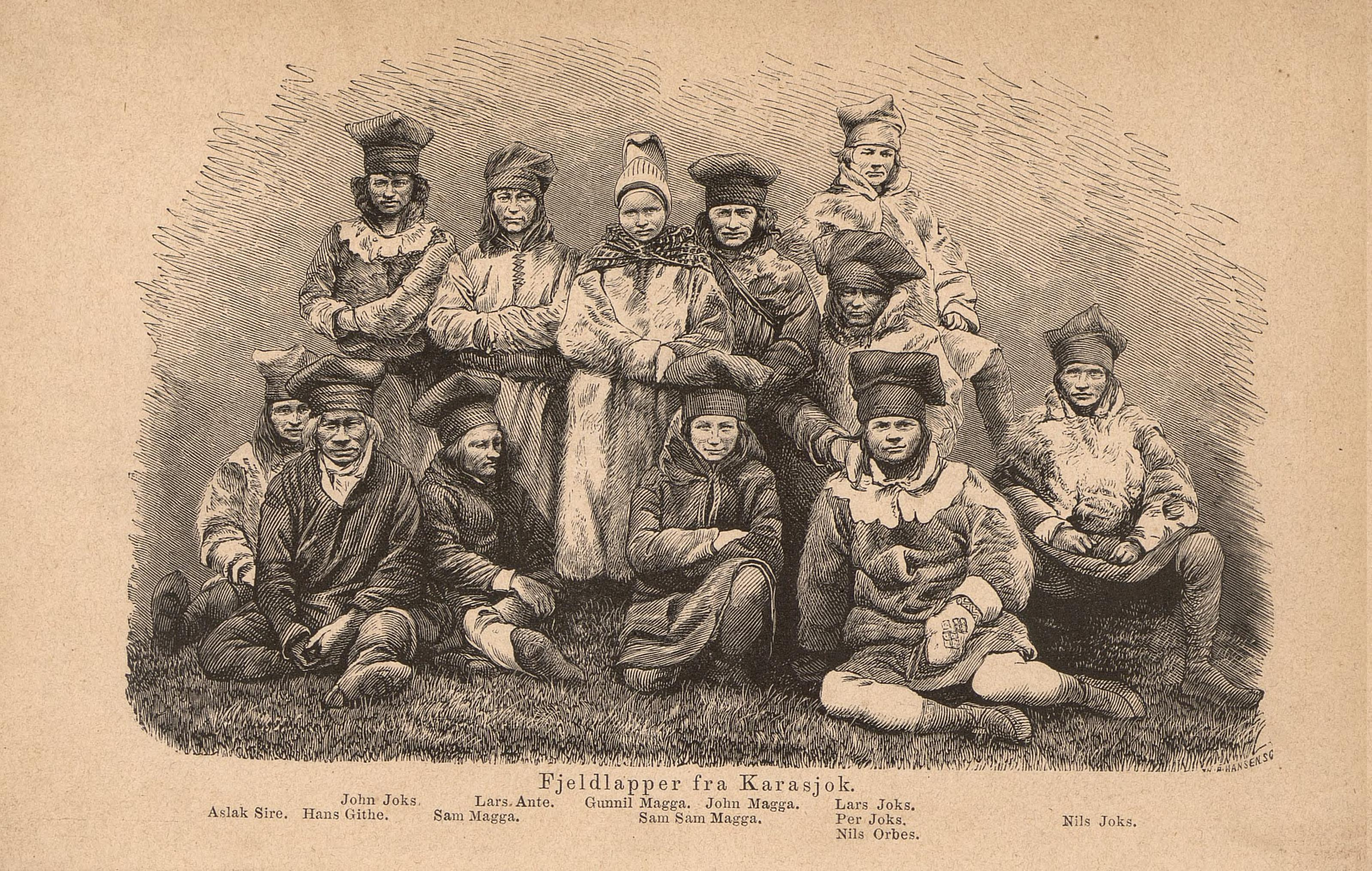 Illustrasjon hentet fra boken "En Sommer i Finmarken, russisk Lapland og Nordkarelen" av Friis, J.A. og utgitt av Cammermeyer (Christiania, 1871)